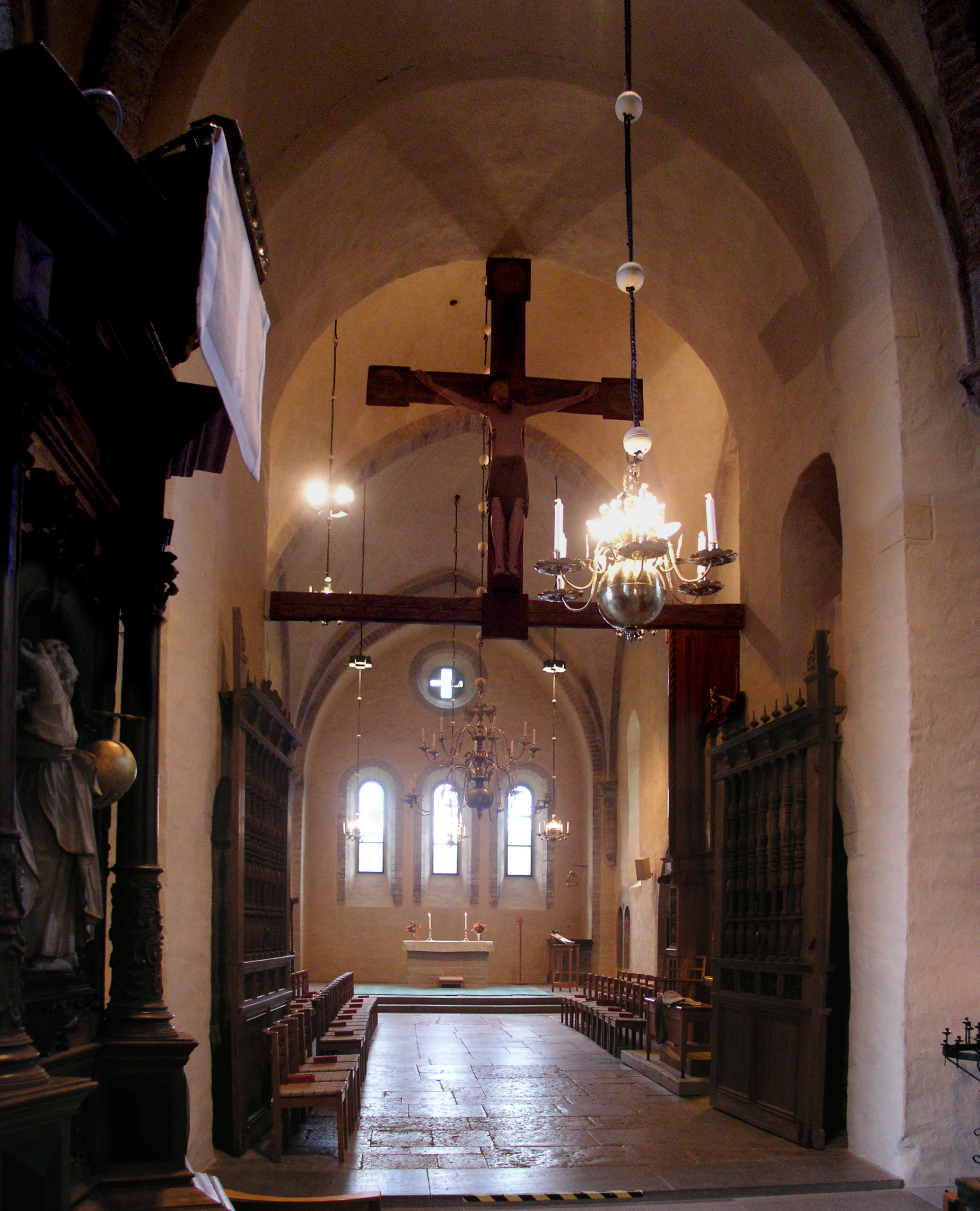 Triumph crucifix, Vreta klosters kyrka, Diocese of Linköping, Sweden